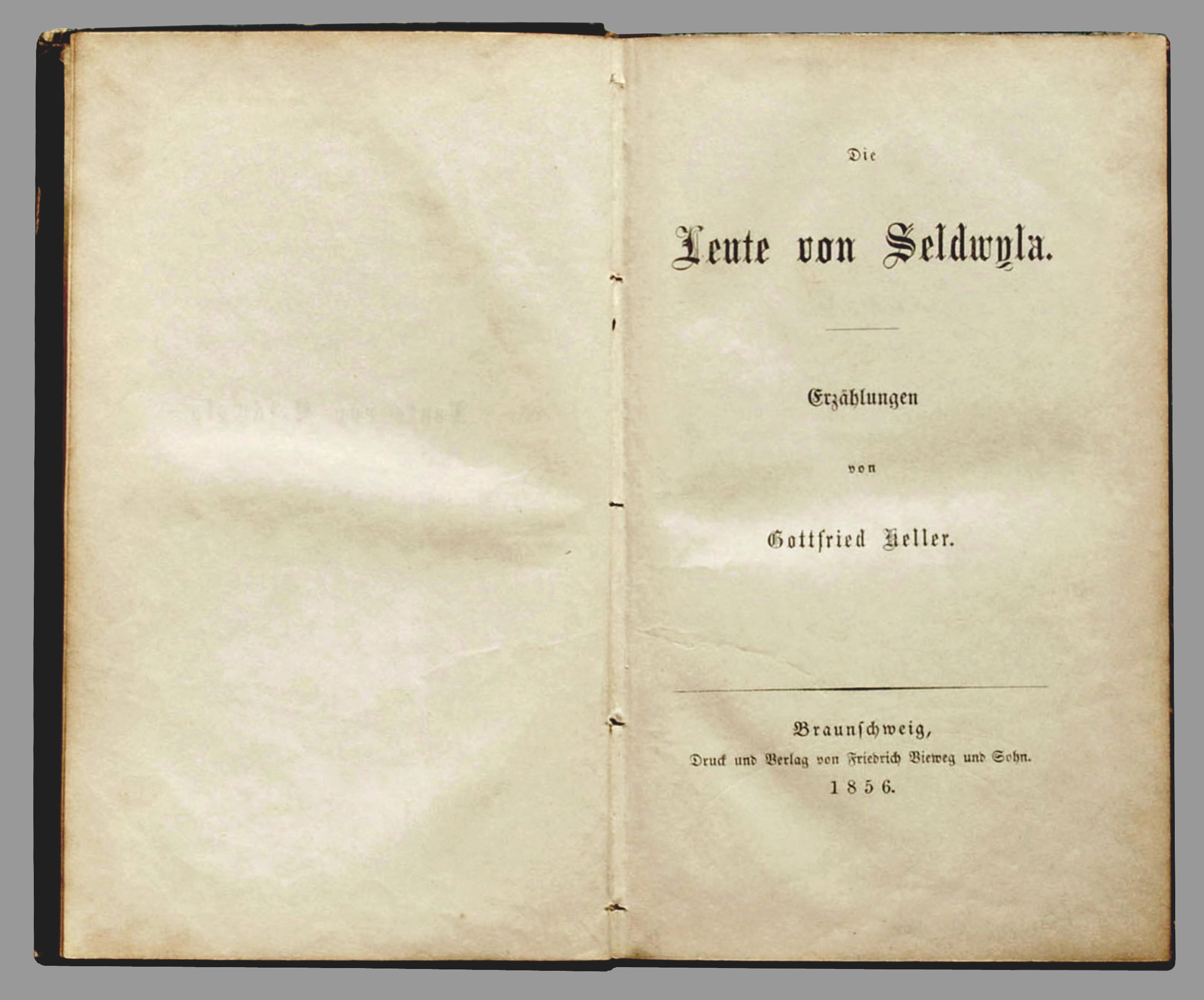 Keller, Gottfried: Die Leute von Seldwyla. Erzählungen. Braunschweig: Vieweg 1856, 523 S., Erstausgabe.